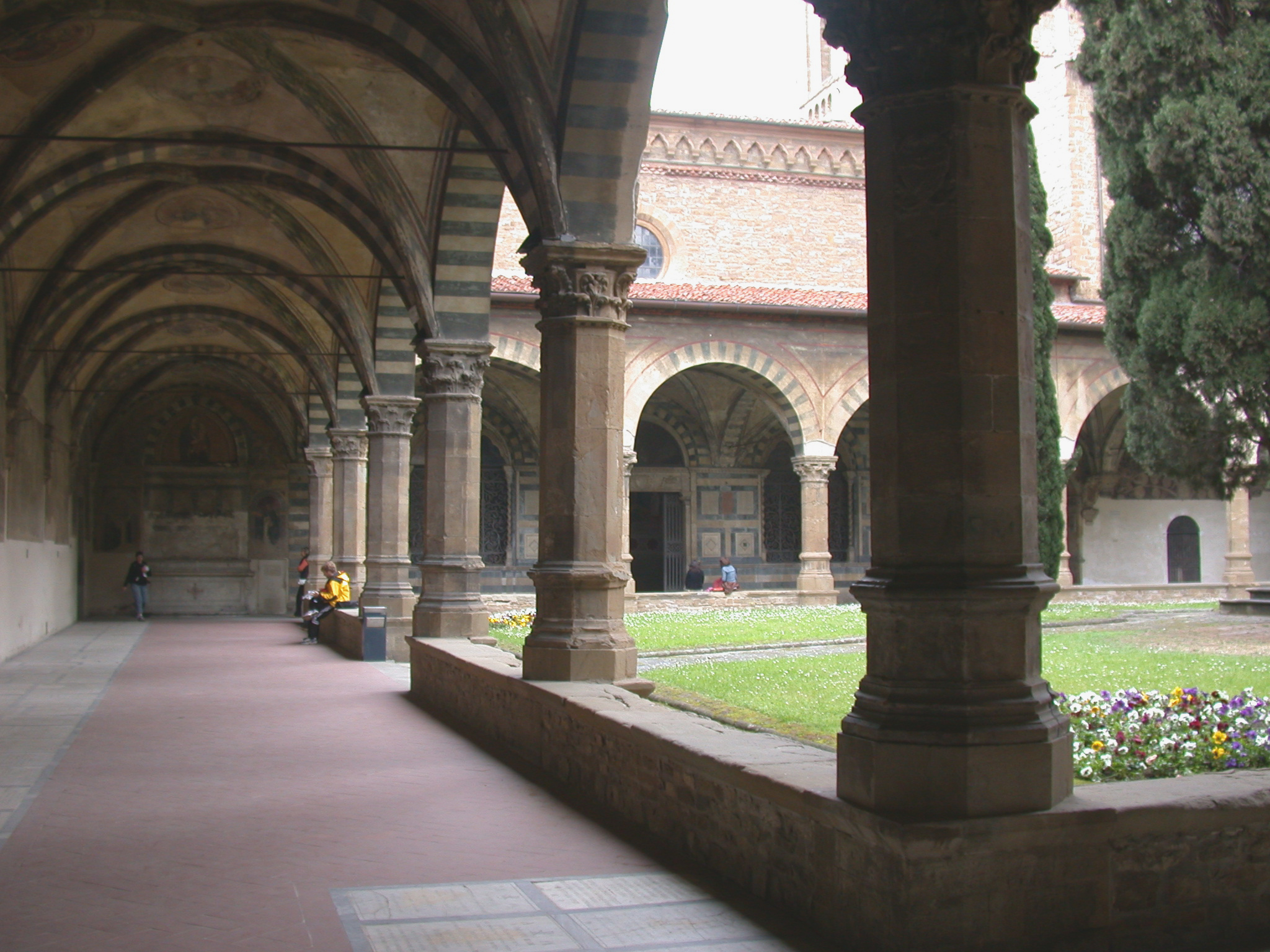 Firenze, Santa Maria Novella, "Chiostro verde". Scattata il 24 aprile 2005 da me.